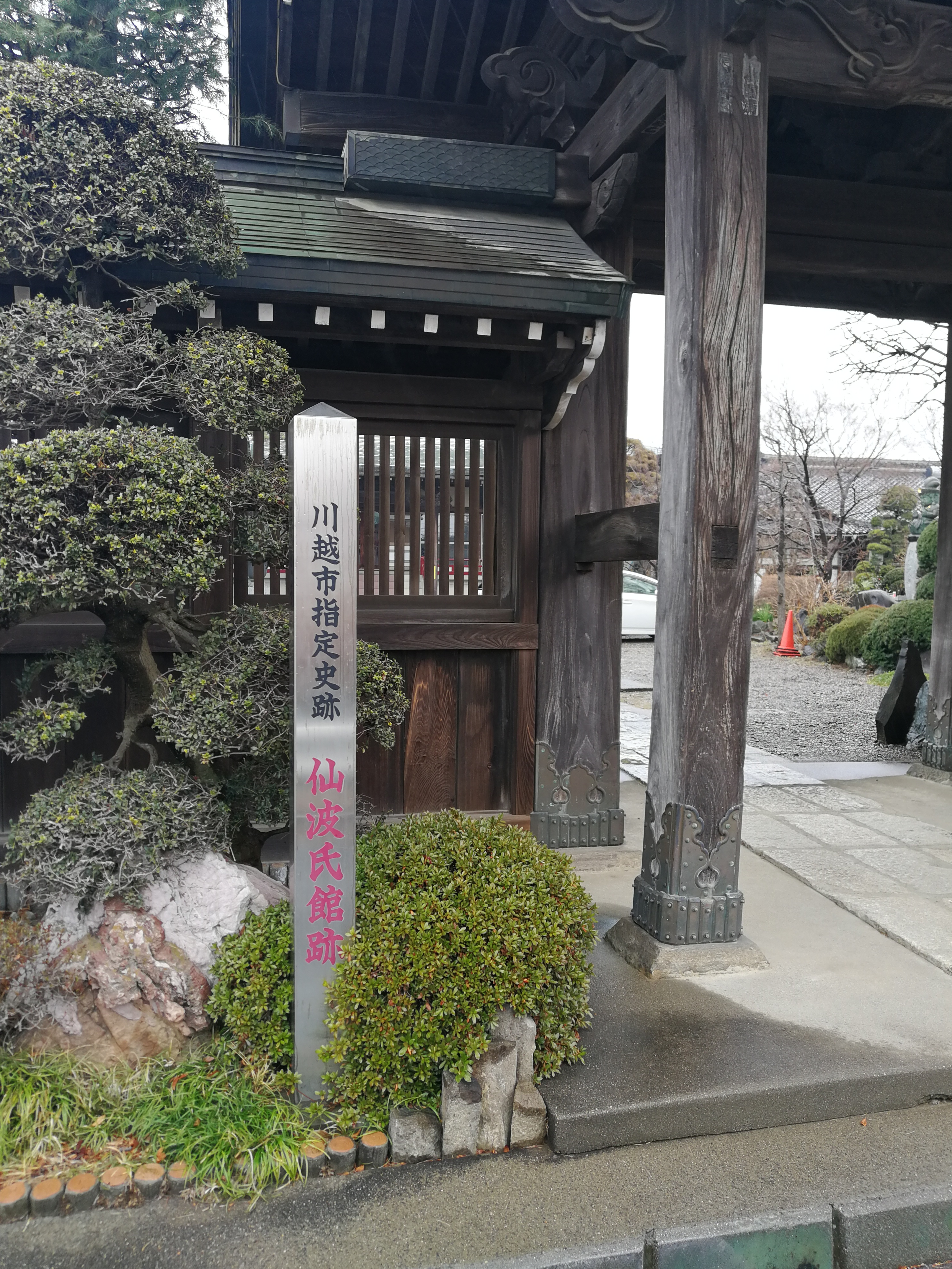 村山党仙波氏の中世期の居館跡とされる。現在は天台宗寺院長徳寺となっているが、寺域内には館の具体的な遺構は残っていない。川越市小仙波町3-31-23に所在。